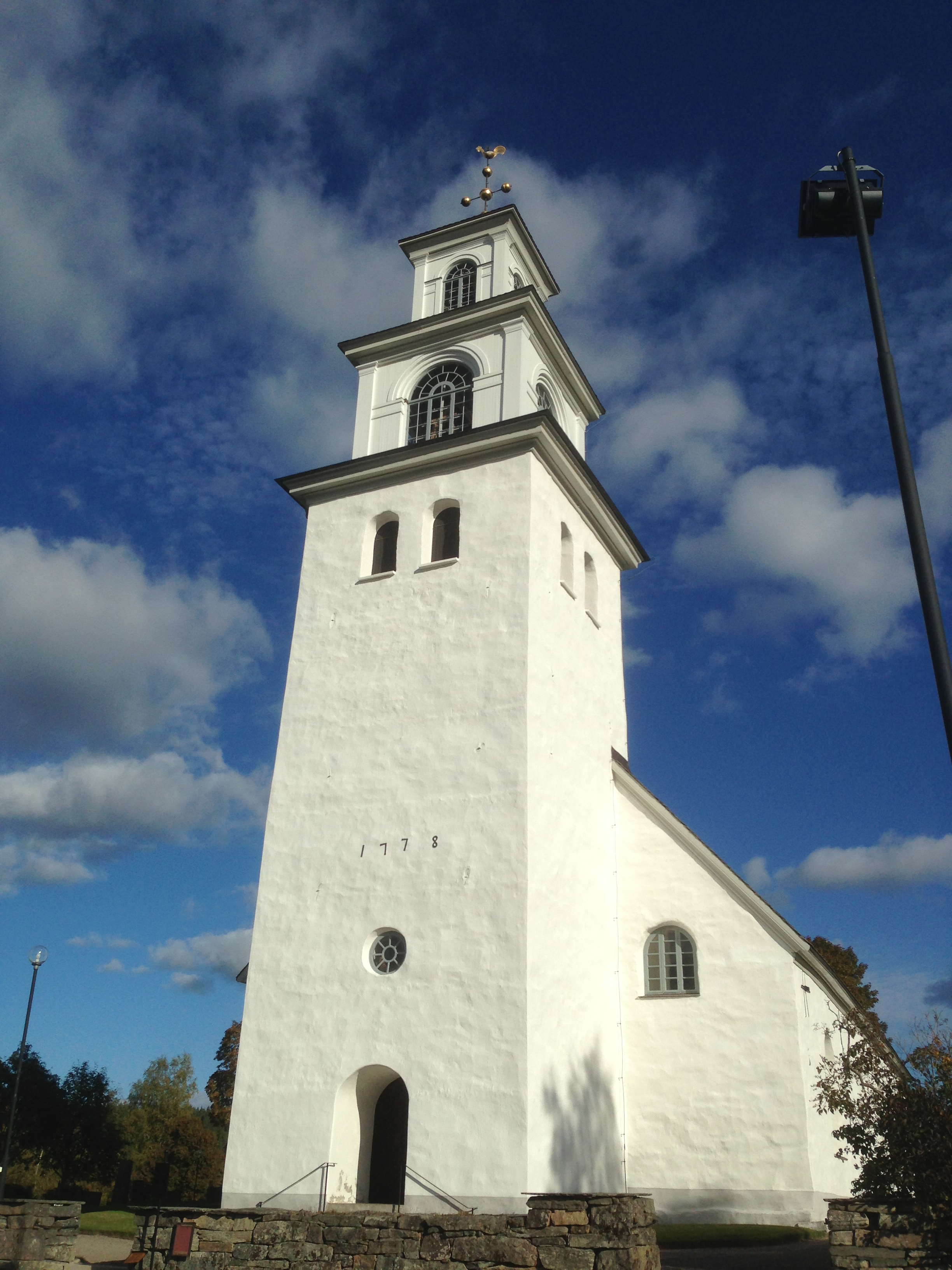 Karlanda kyrka (Bjärn 1:59)